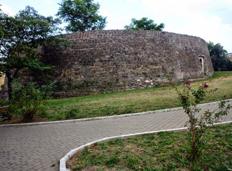 Mausoleo del Torrione Prenestino This is a photo of a monument which is part of cultural heritage of Italy.